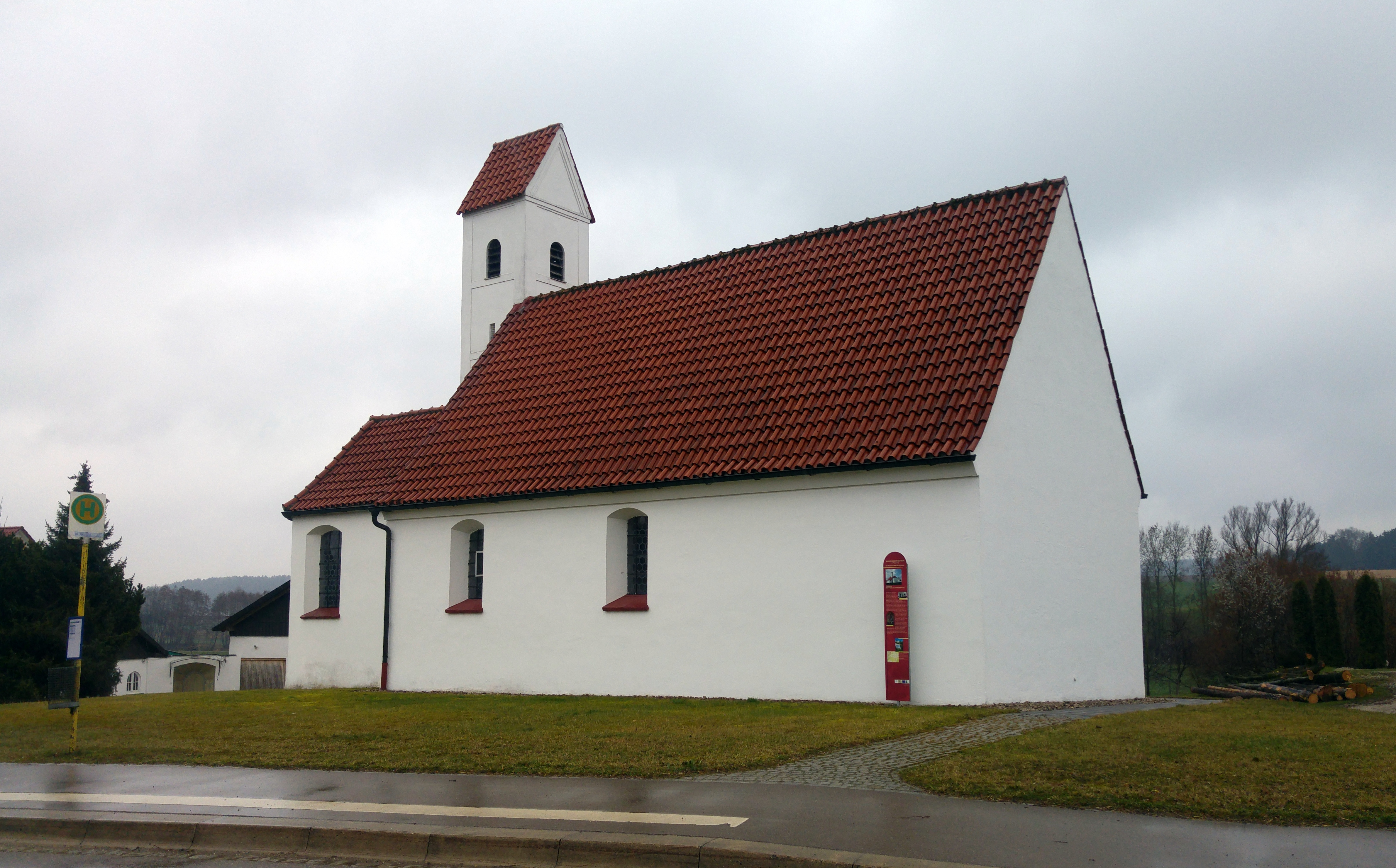 Baudenkmäler Hollenbach, Kirche St. Ulrich in Schönbach, Aktennummer D-7-71-140-13 schlichter Saalbau mit eingezogenem Chor und südöstlichem Satteldachturm, im Kern 15. Jahrhundert, Ende 17. Jahrhundert verändert, Turm um 1970; mit Ausstattung